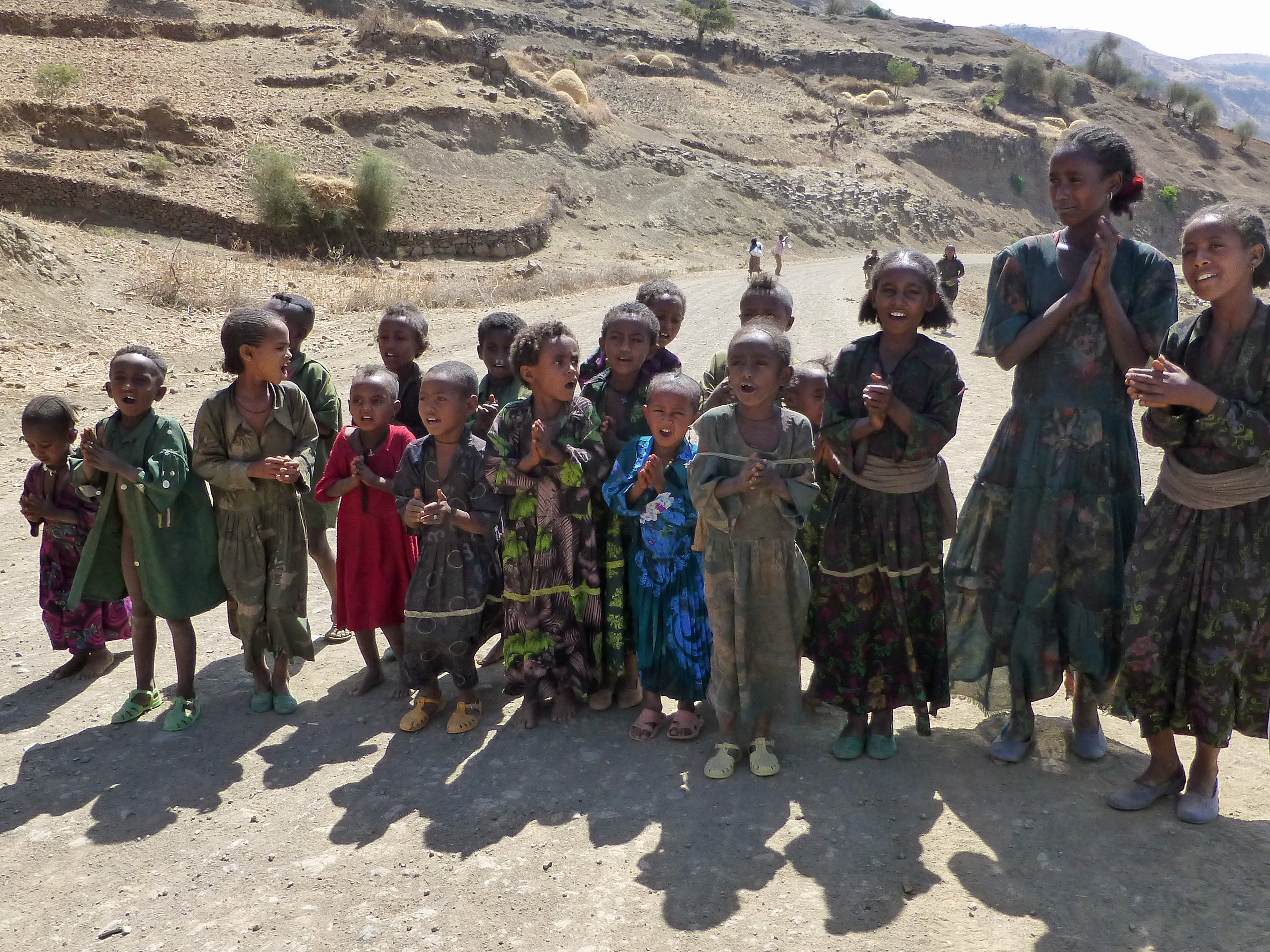 Nord de l'Ethiopie, entre Sekota et Mékélé : écoliers (et leurs institutrices) chantant en tigray au bord de la route